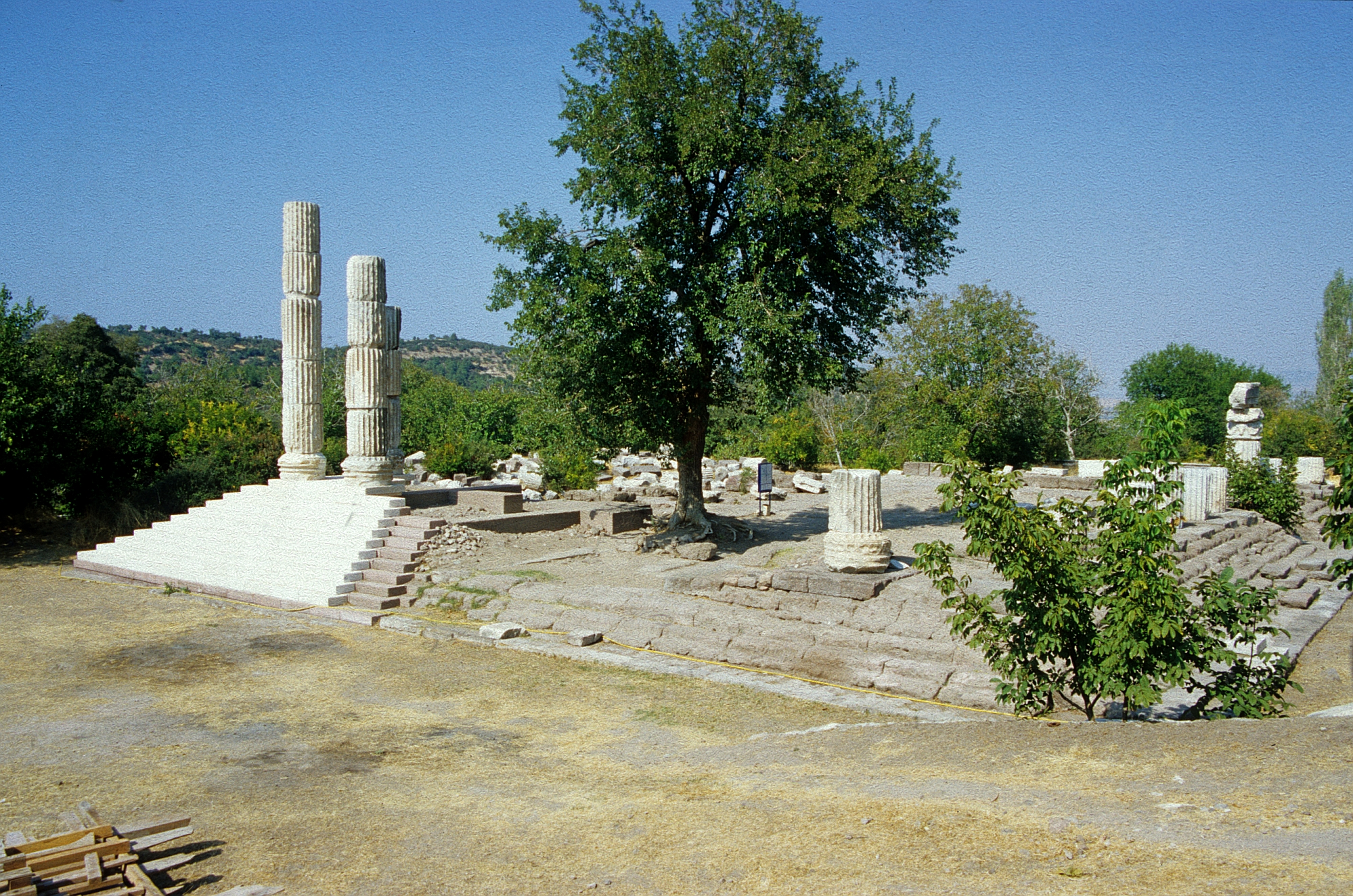 Tempel des Apollo Smintheus in Chryse, heute Gülpinar, Westtürkei